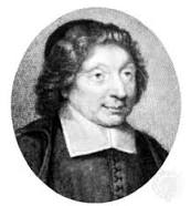 gravure